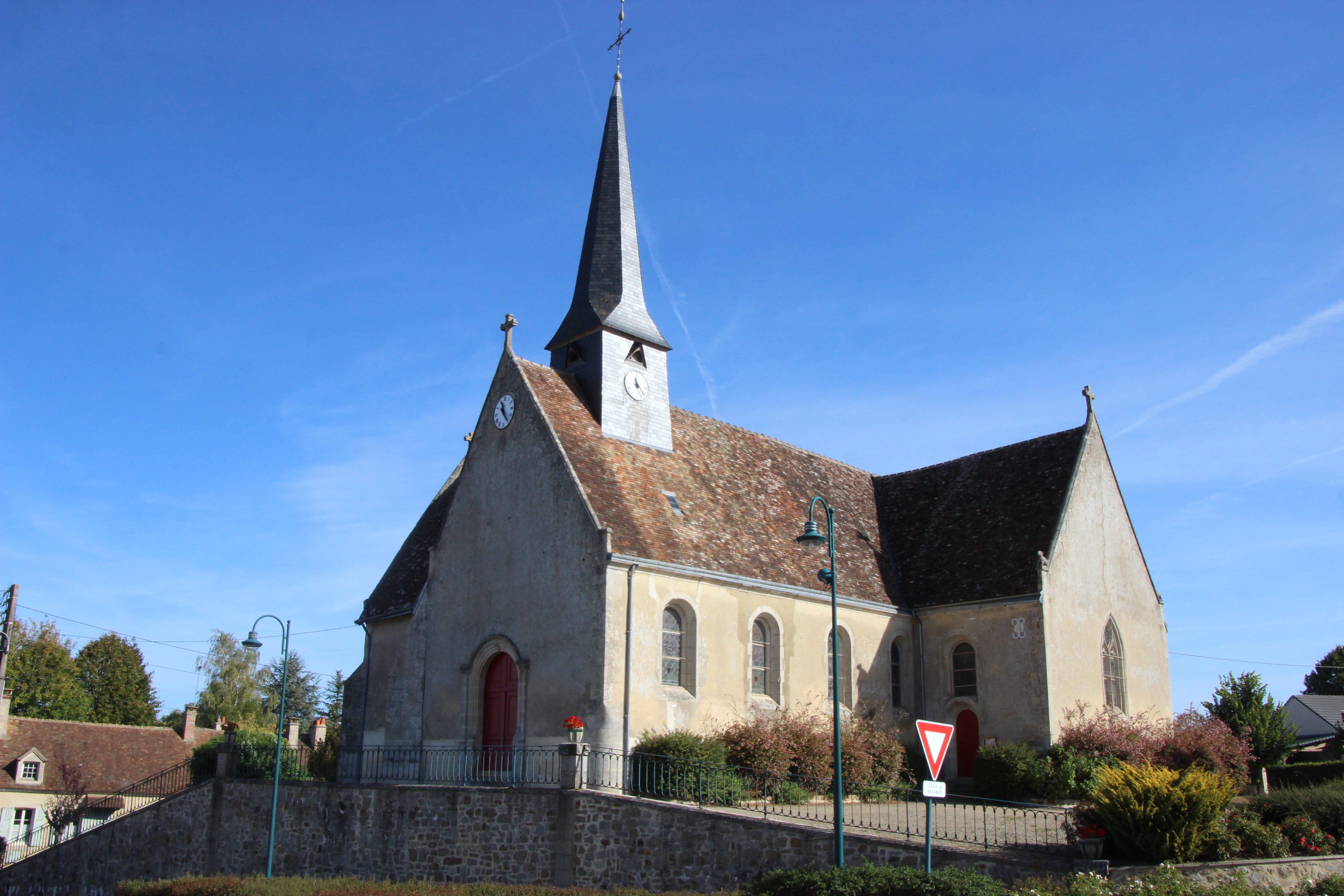 Saint-Rémy-des-Monts